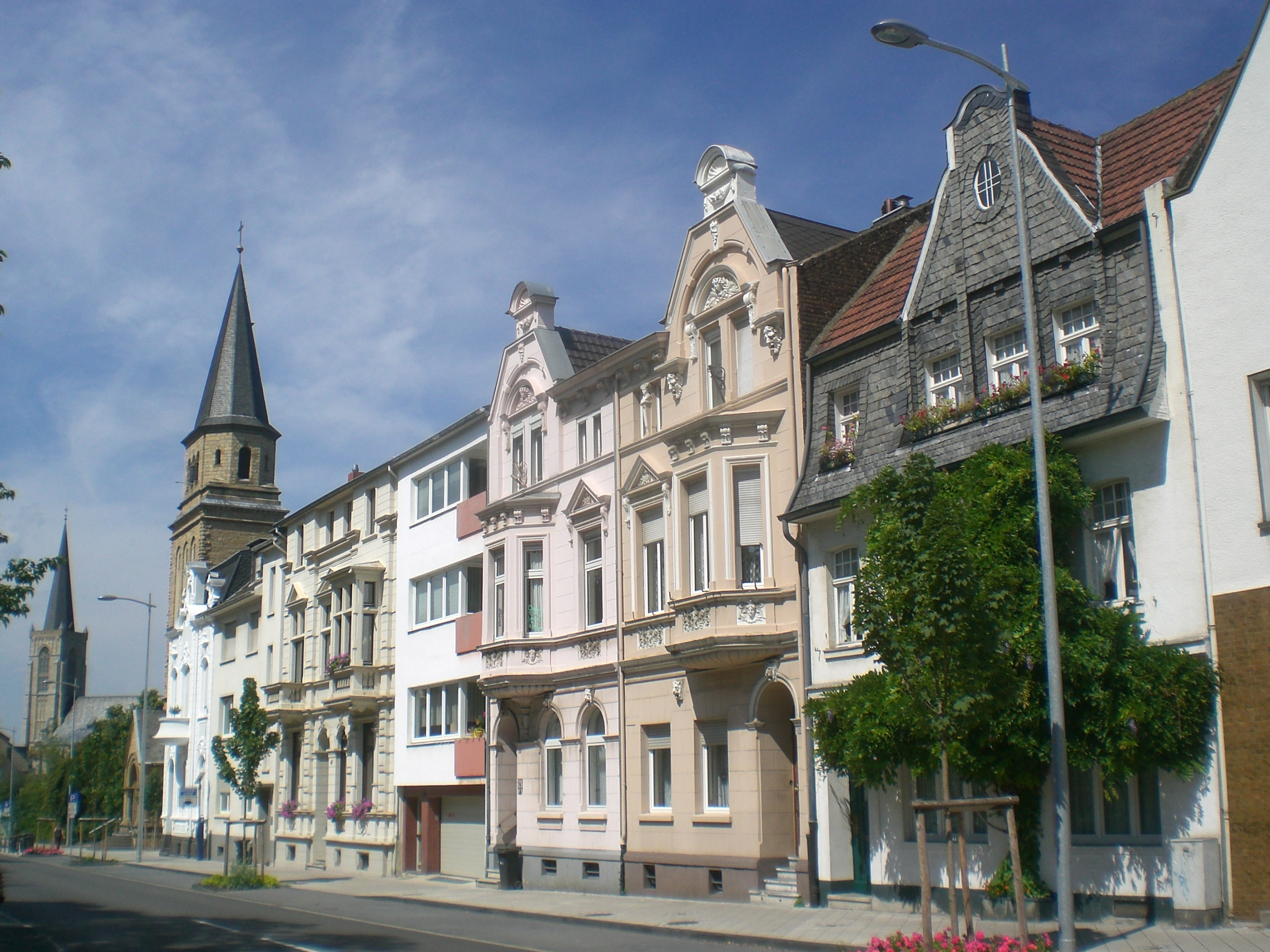 Fassaden in Euskirchen (Kölner Straße)